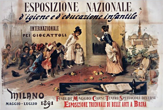 Esposizione nazionale d'igiene e d'educazione infantile e internazionale dei gioccatoli. Esposizione triennale di Belle Arti a Brera, 1891. Milano - Italia.